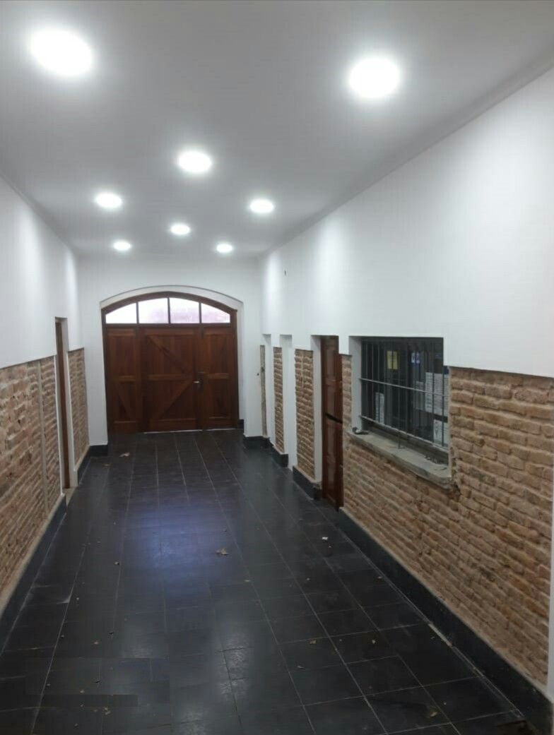 Hall